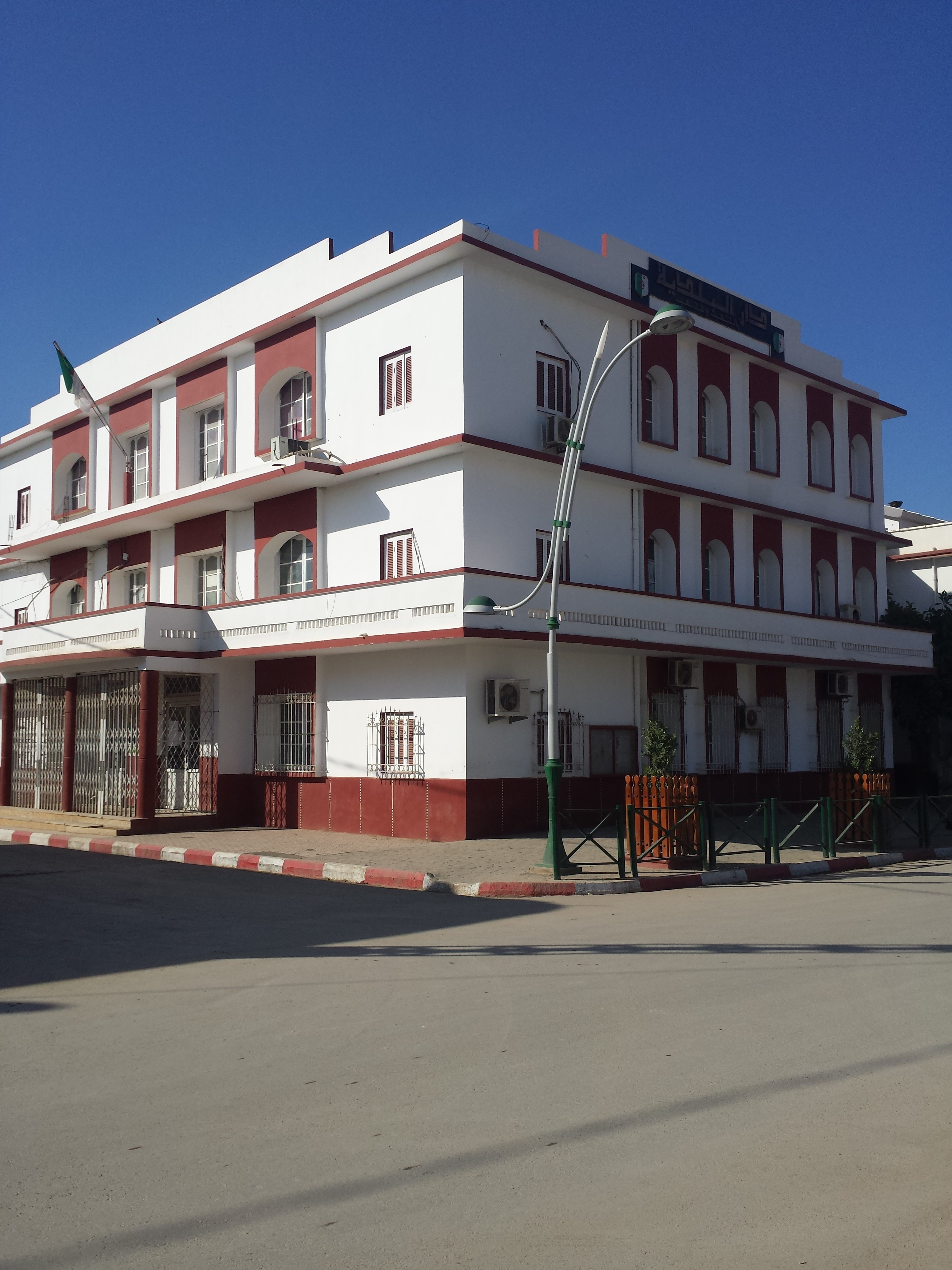 branche de mairie de BOUKADIR